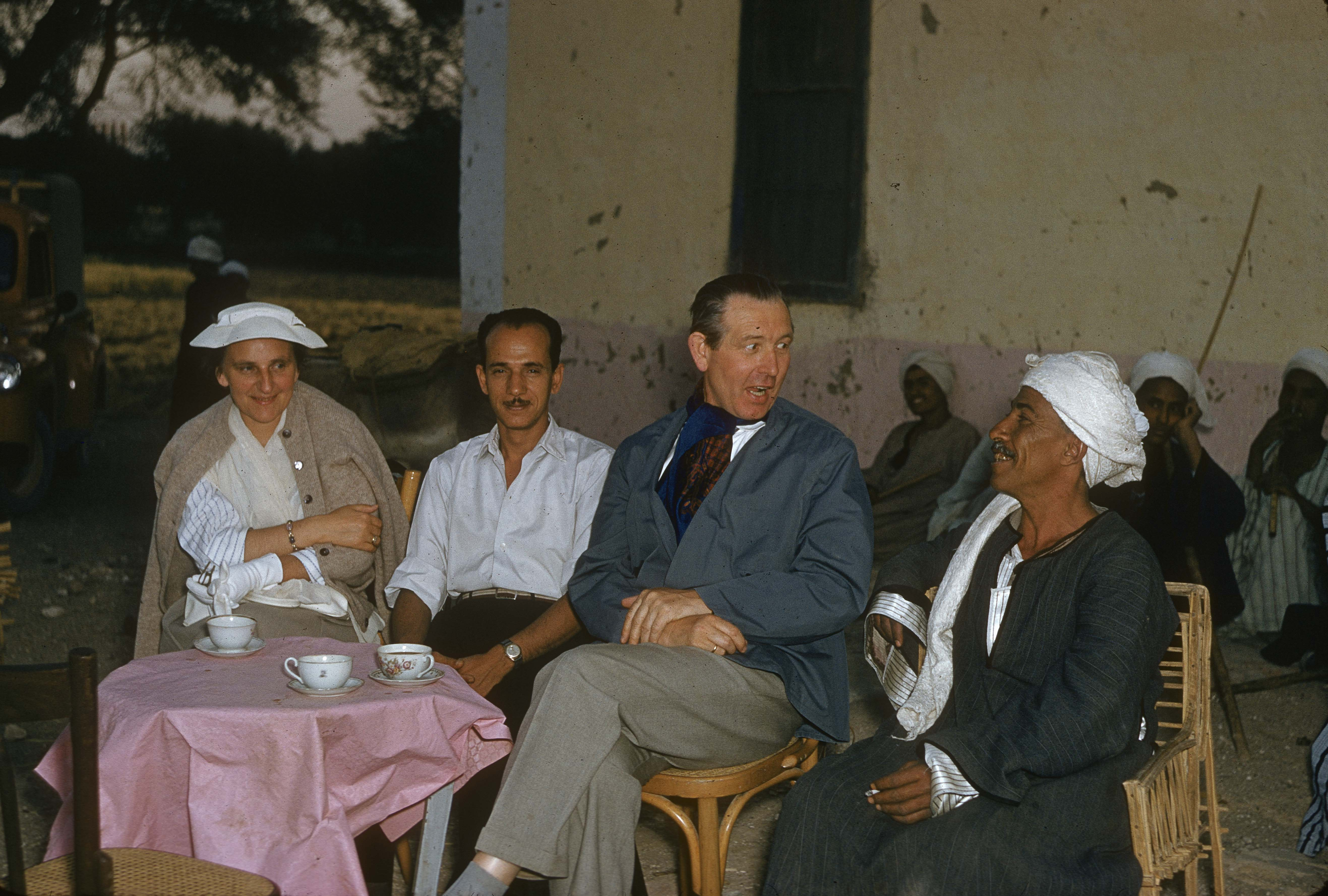 Im Marsam Hotel in Theben mit Scheich Ali Abd el-Rasul und Antikeninspektor Ibrahim Nawawy